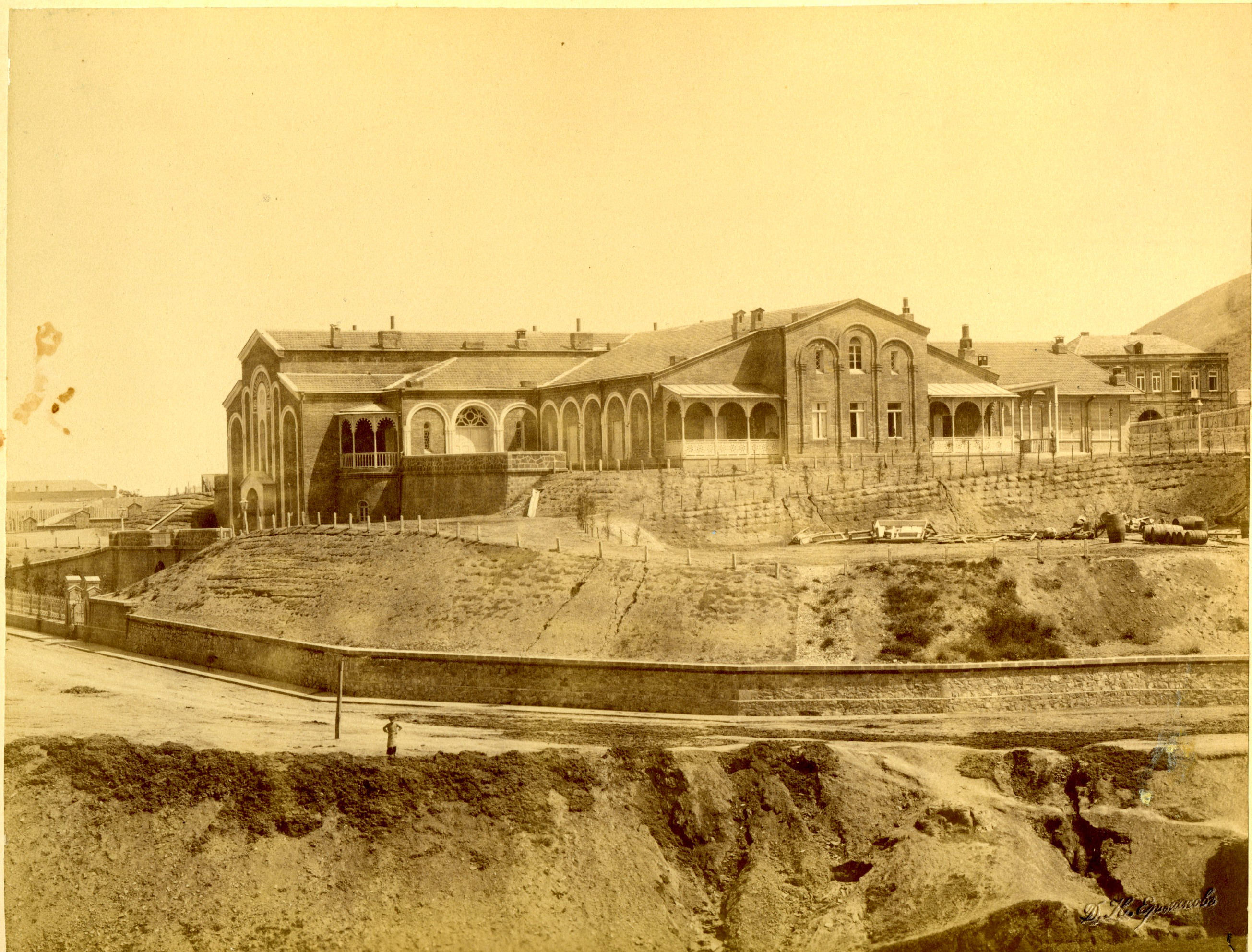 Здание и территория нынешнего Винного завода №1, который расположен на улице Василия Петриашвили 1, в городе Тбилиси. Удельный подвал (он же - Винный завод №1, был построен в 1894-1896г.) по приказу императорского двора для хранения и производства вина.